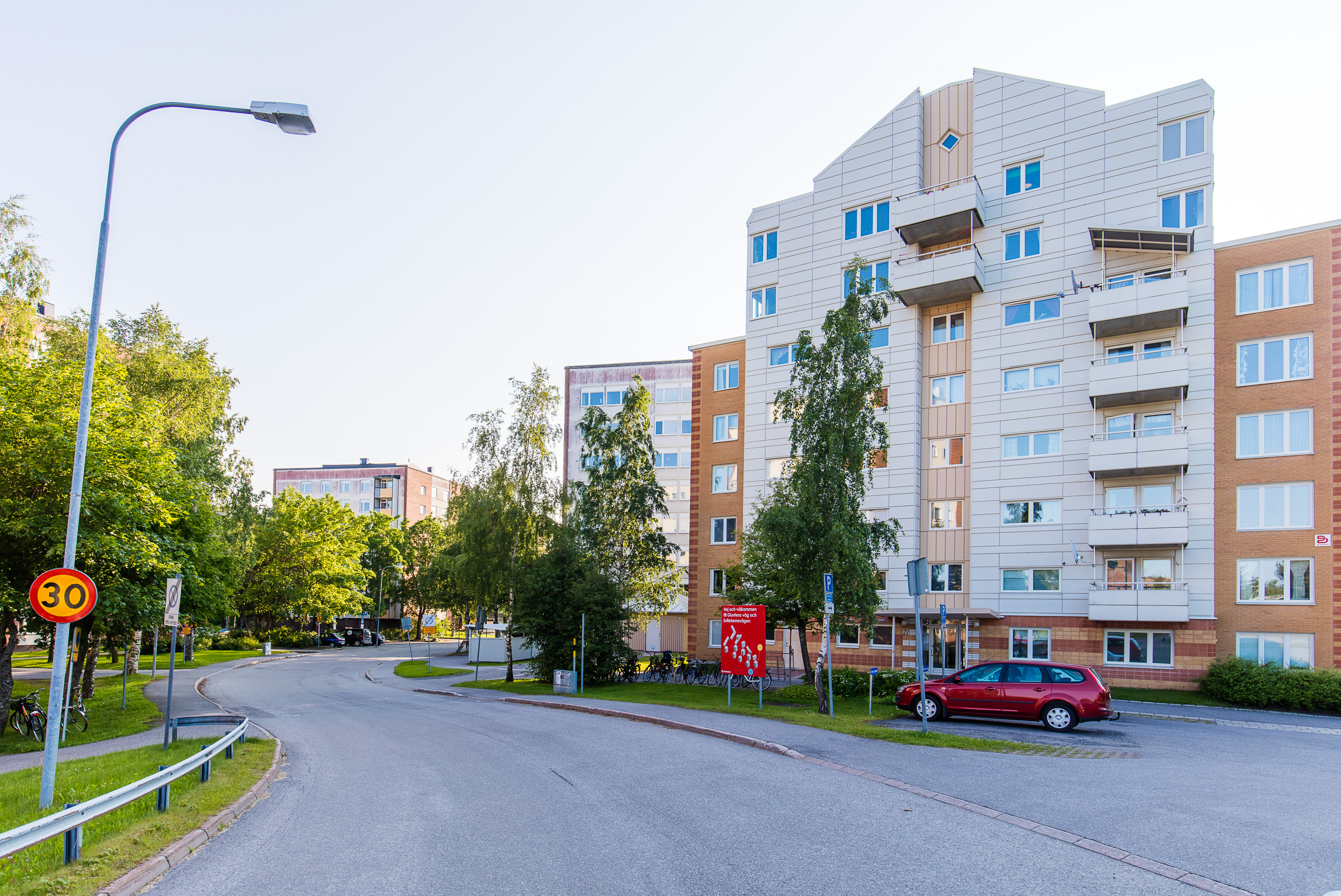 Tunnelbacken är ett bostadsområde i Umeå, beläget mellan sjukhusområdet och Sofiehem/Ålidhem.